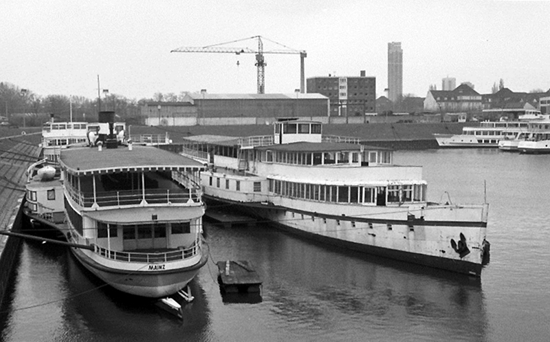 Die Raddampfer Mainz und Cecilie im April 1978 im Becken 4a des Niehler Hafens in Köln.